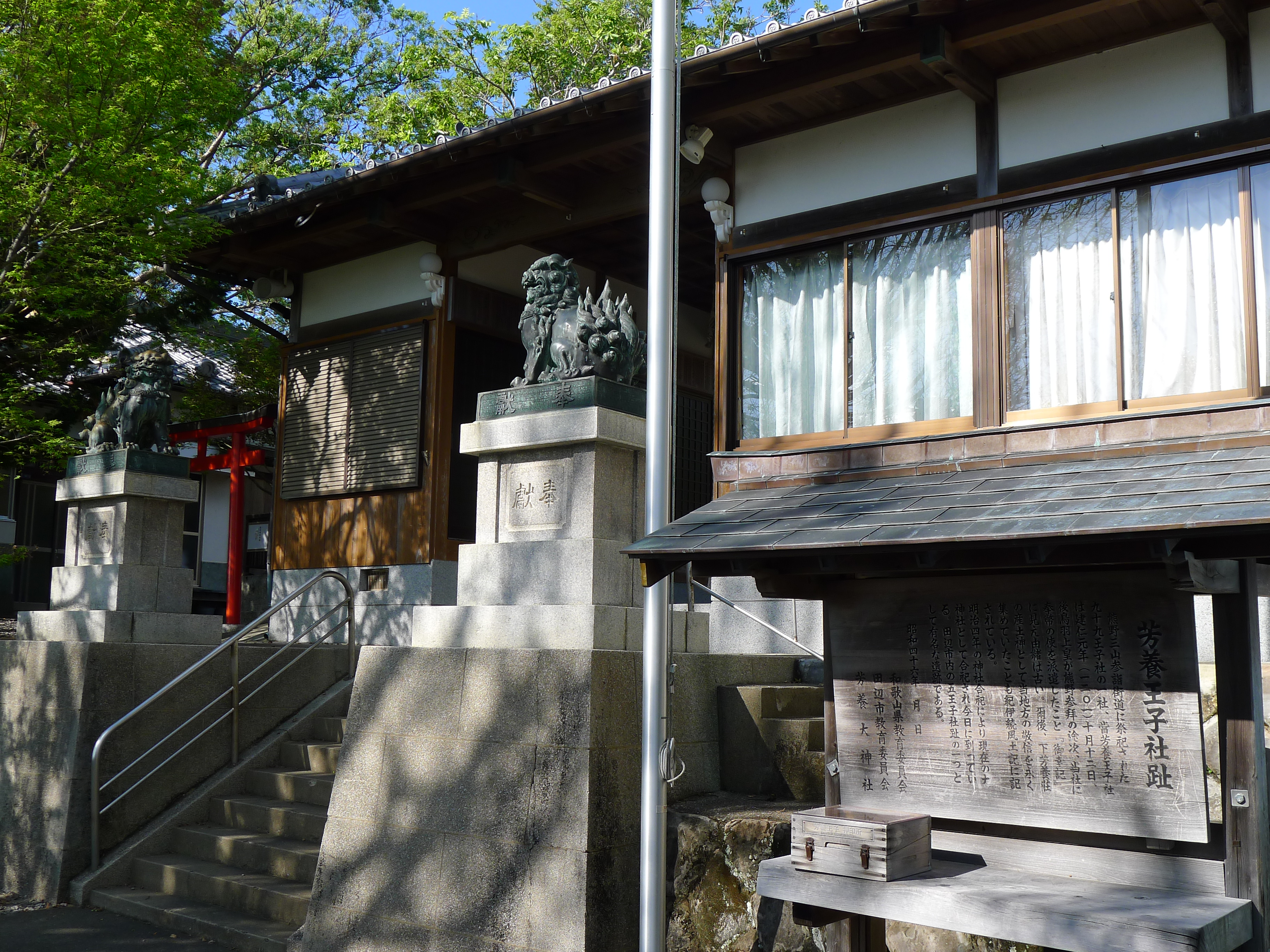 熊野古道・紀伊路の九十九王子の一つ芳養王子を祀る大神社（和歌山県田辺市）